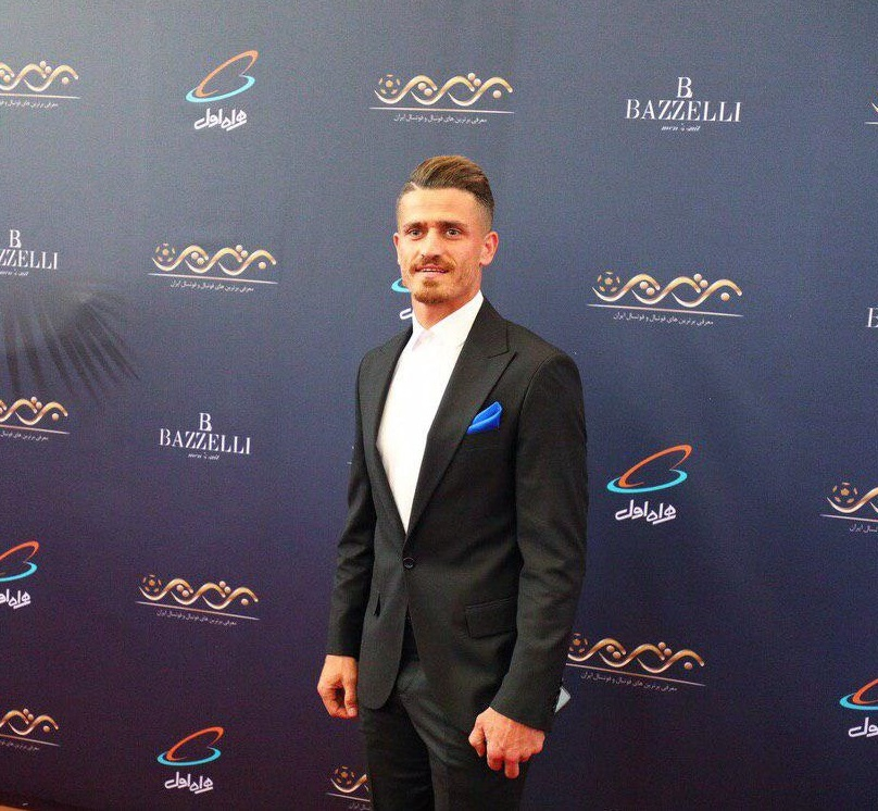 گزارش تصویری از مراسم برترین‌های لیگ برتر فوتبال در فصل 97-98